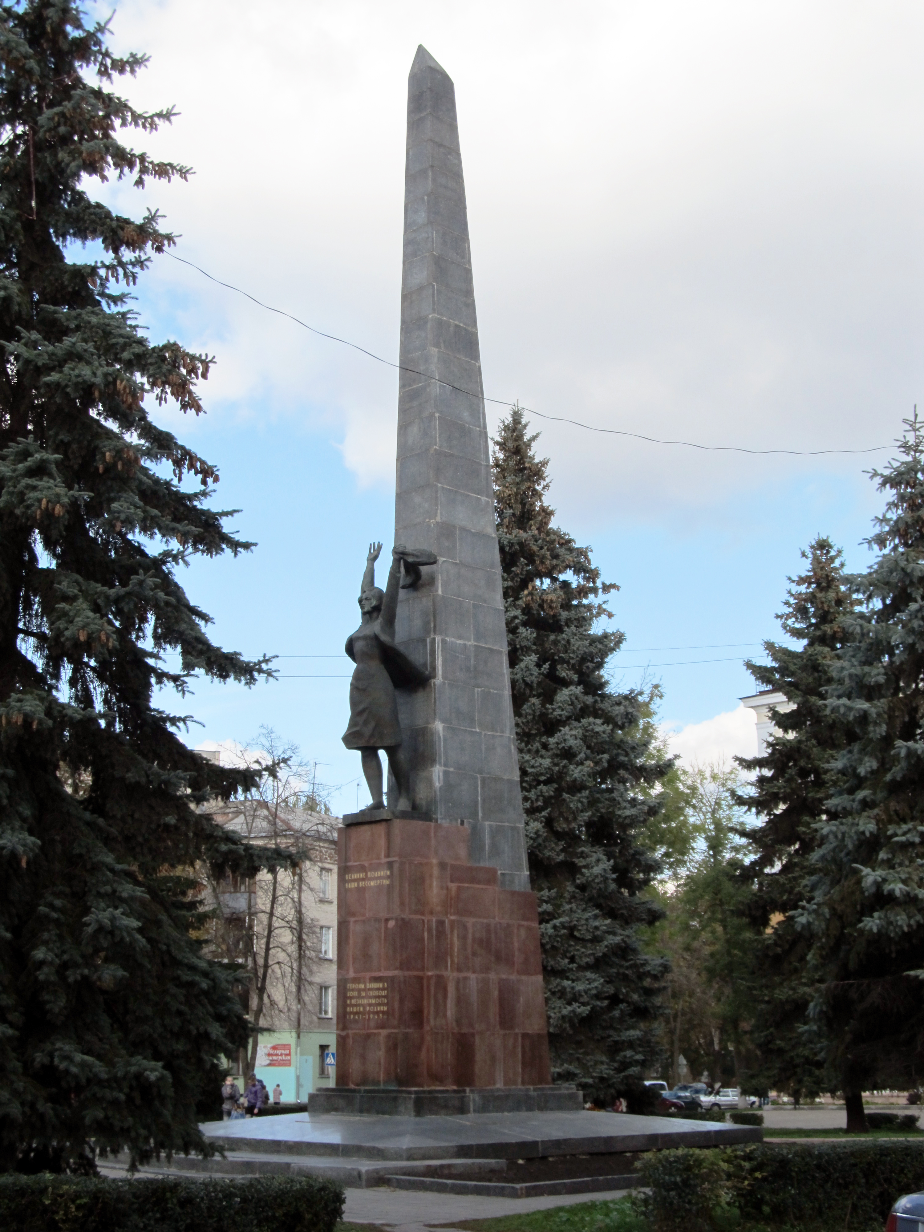 Беларуская (тарашкевіца): Братэрская магіла. г. Гомель This is a photo of Belarusian heritage monument. Reference number: 313Д000030 ( WLM)